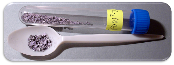 Uhličitan chromitý - Cr2(CO3)3